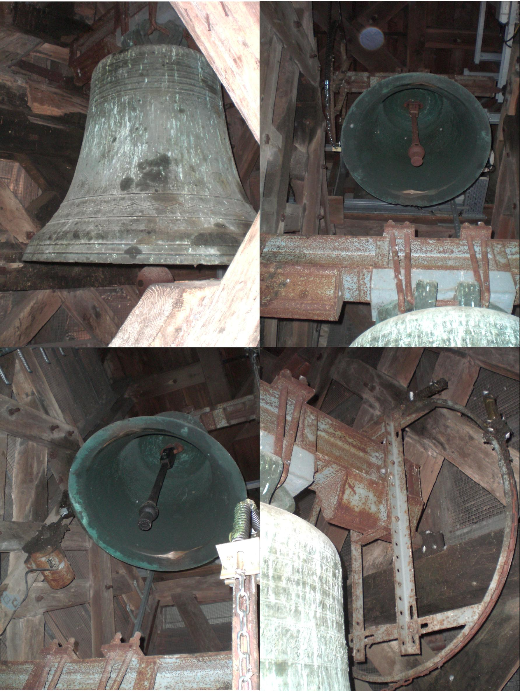 Salle des cloches de l'église de Viarmes, Val d'Oise, France